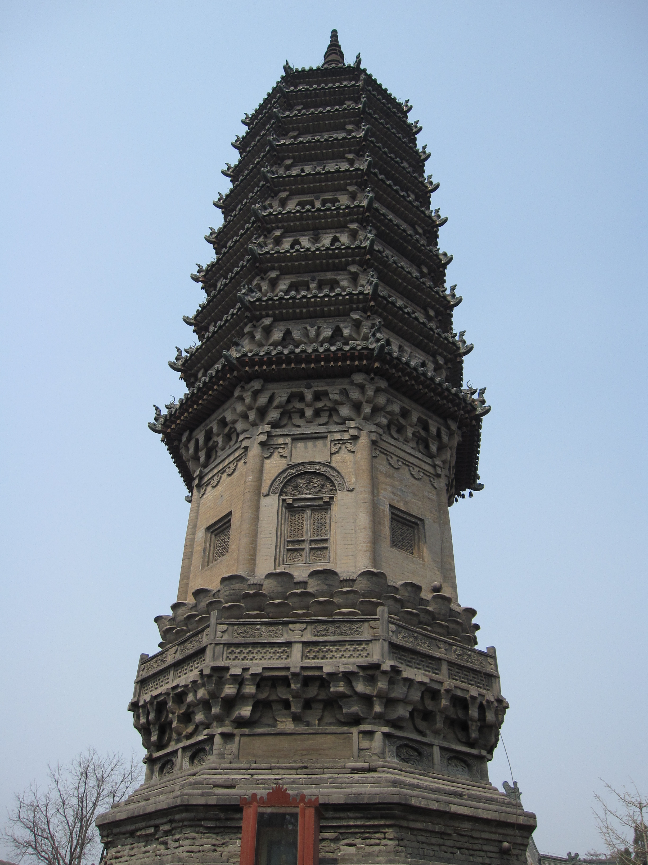 The Chengling Pagoda in Zhengding, Hebei, China